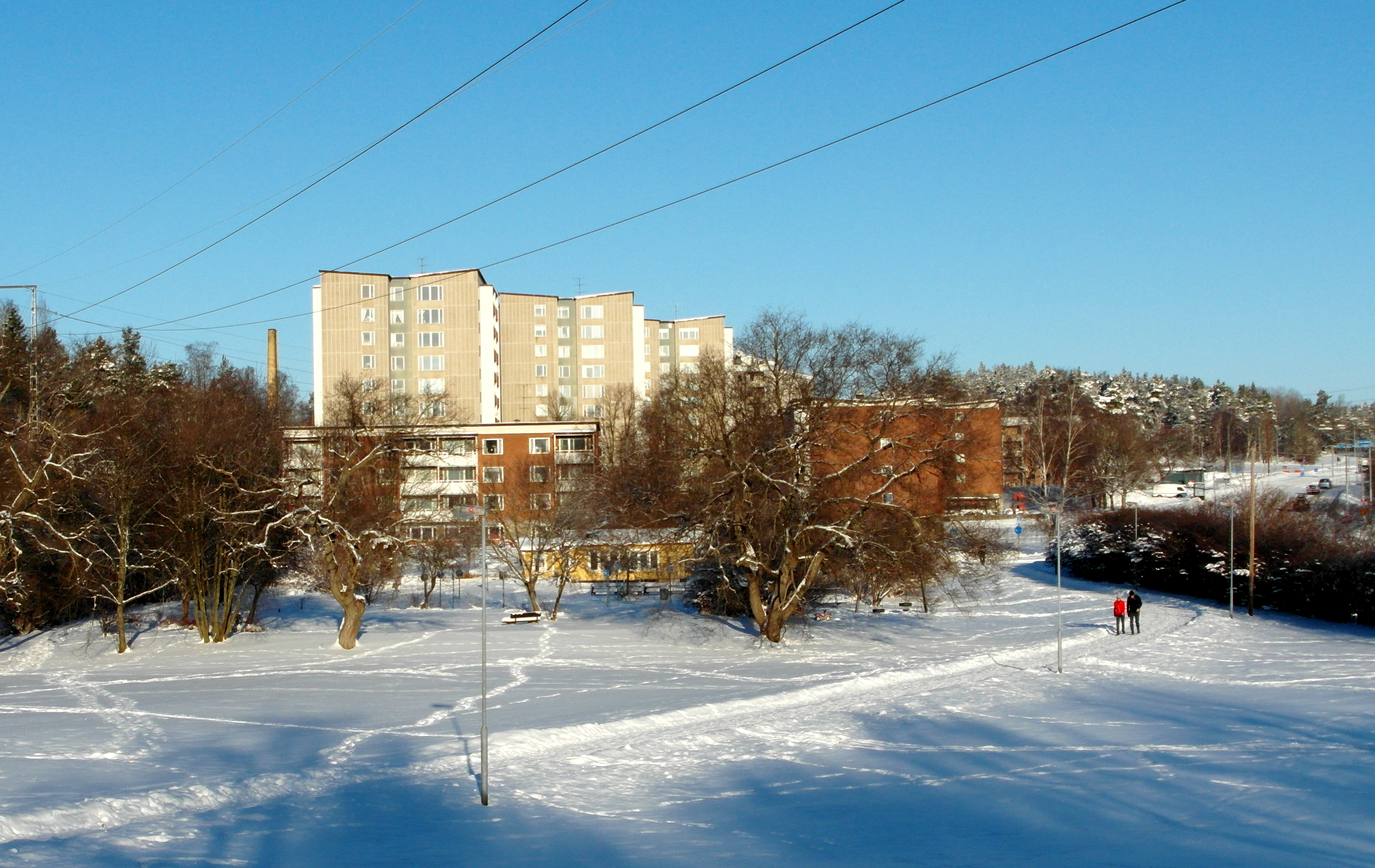 Rinkeby, Danderyd, vyfrån Söder